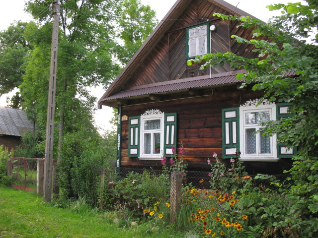 Ginący świat. Zobacz go, póki jeszcze istnieje...